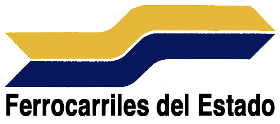 Logo de Ferrocarriles del Estado entre 1989 y 1993